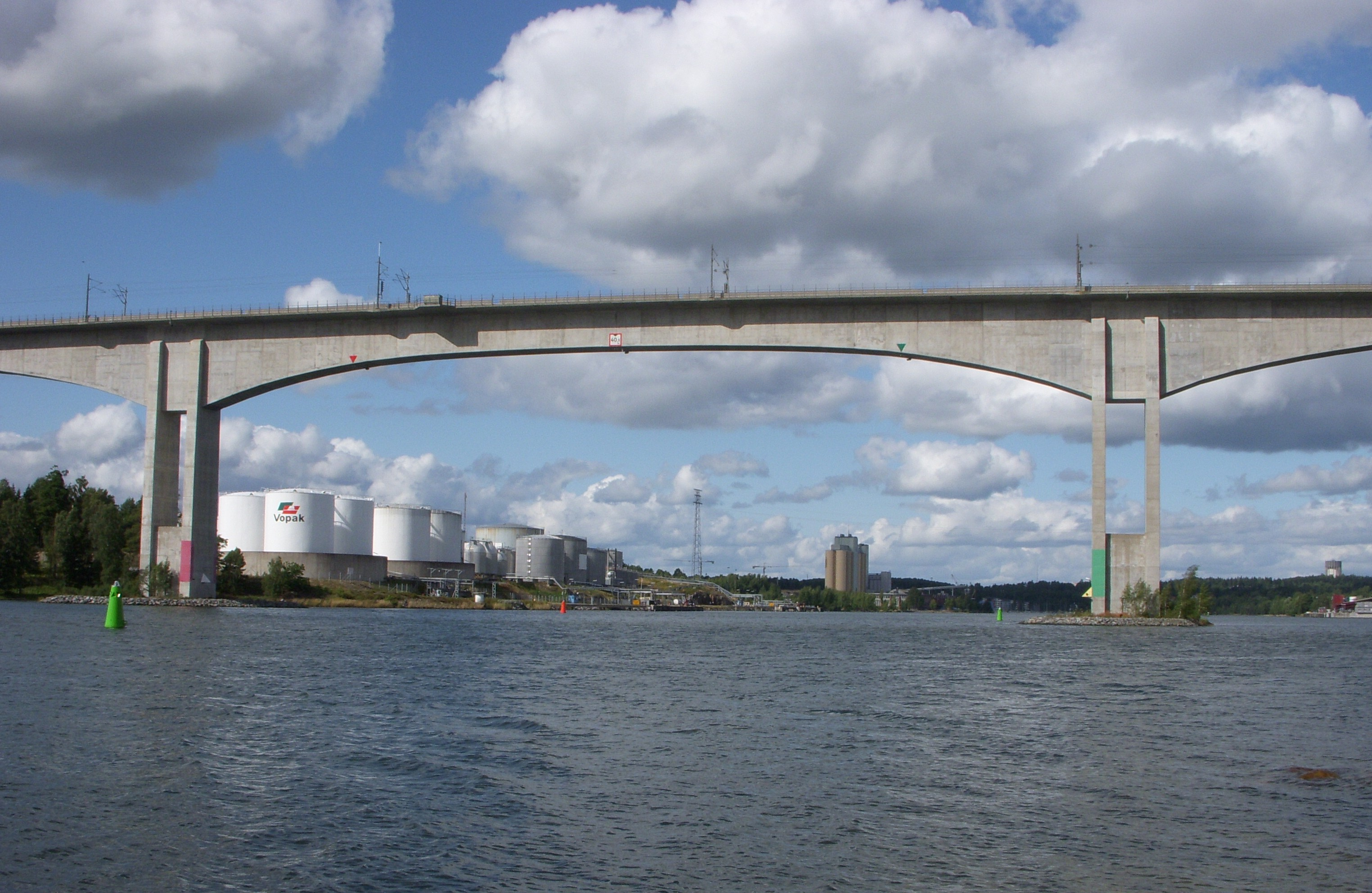 Högbron för järnvägen och Södertäljes hamn